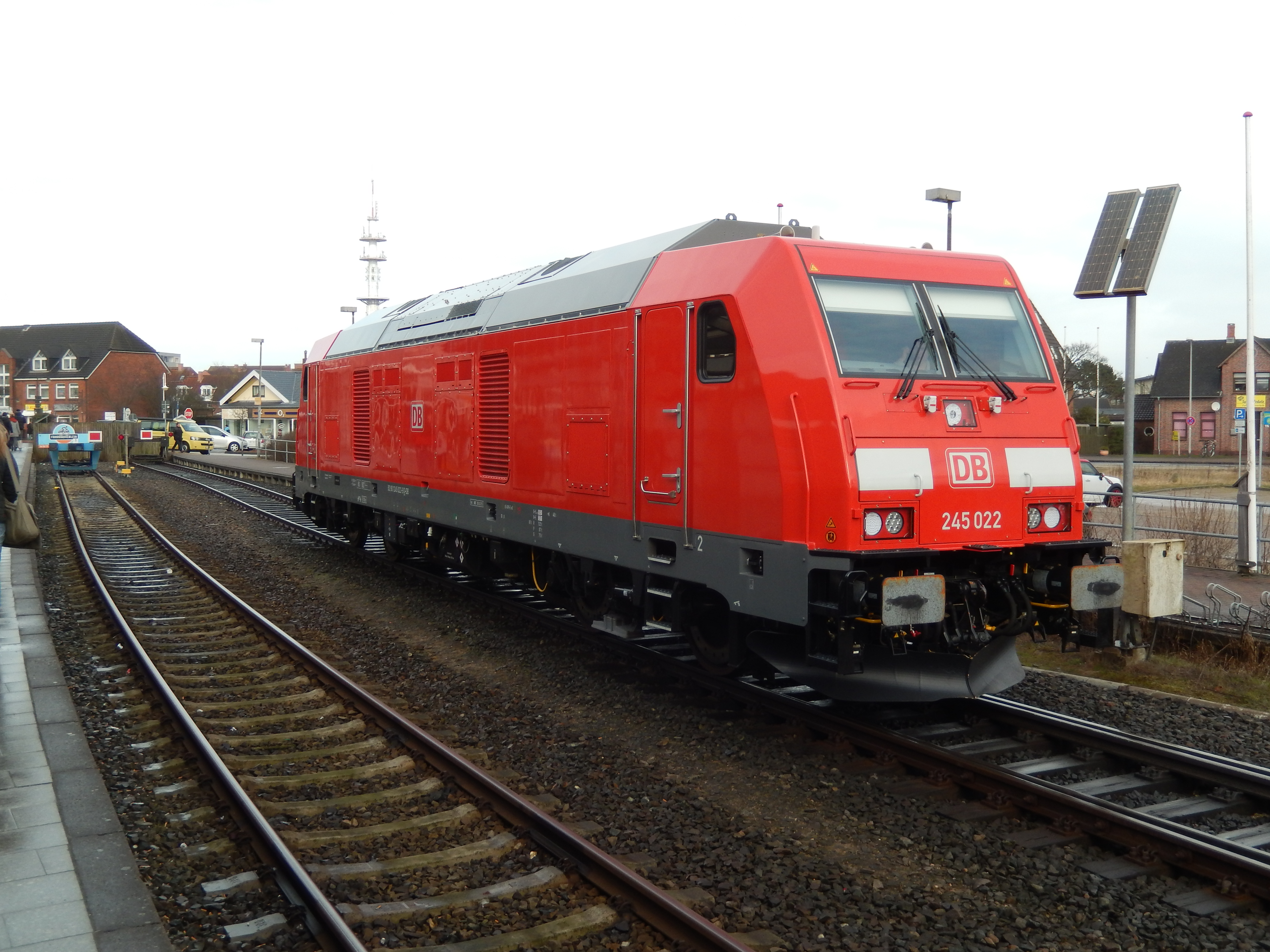 DB 245 022 in Westerland (Sylt)